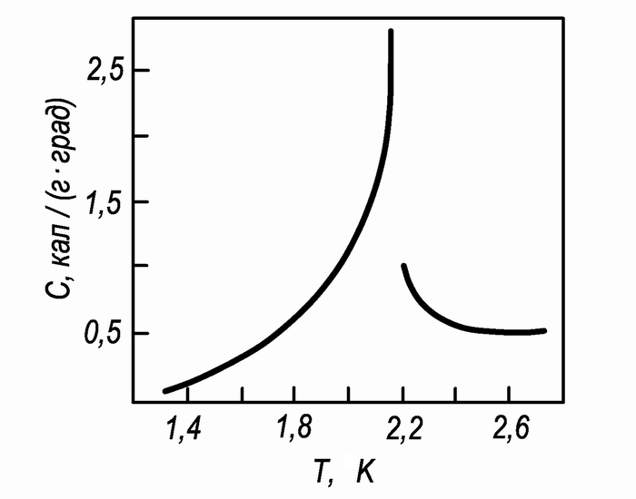 He liquid